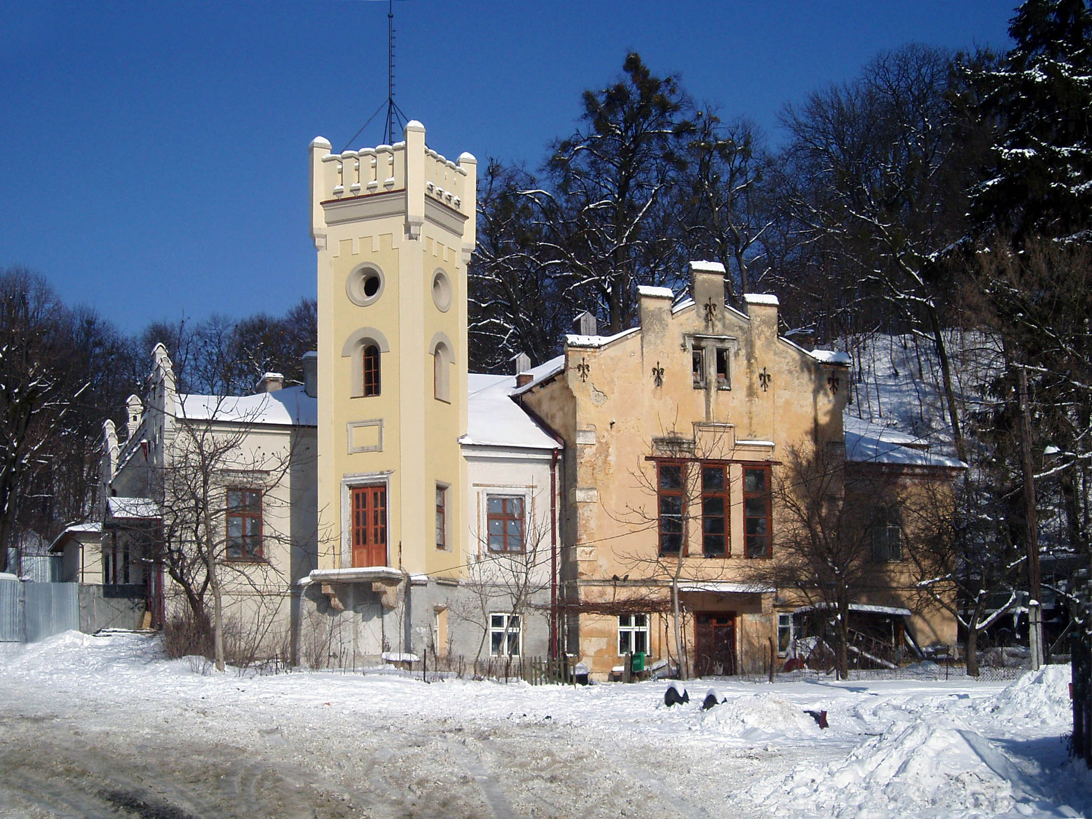 Будинок Cтрілецького товариства на вулиці Лисенка 23а у Львові. Збудований 1871 року за проектом Йозефа Енґеля